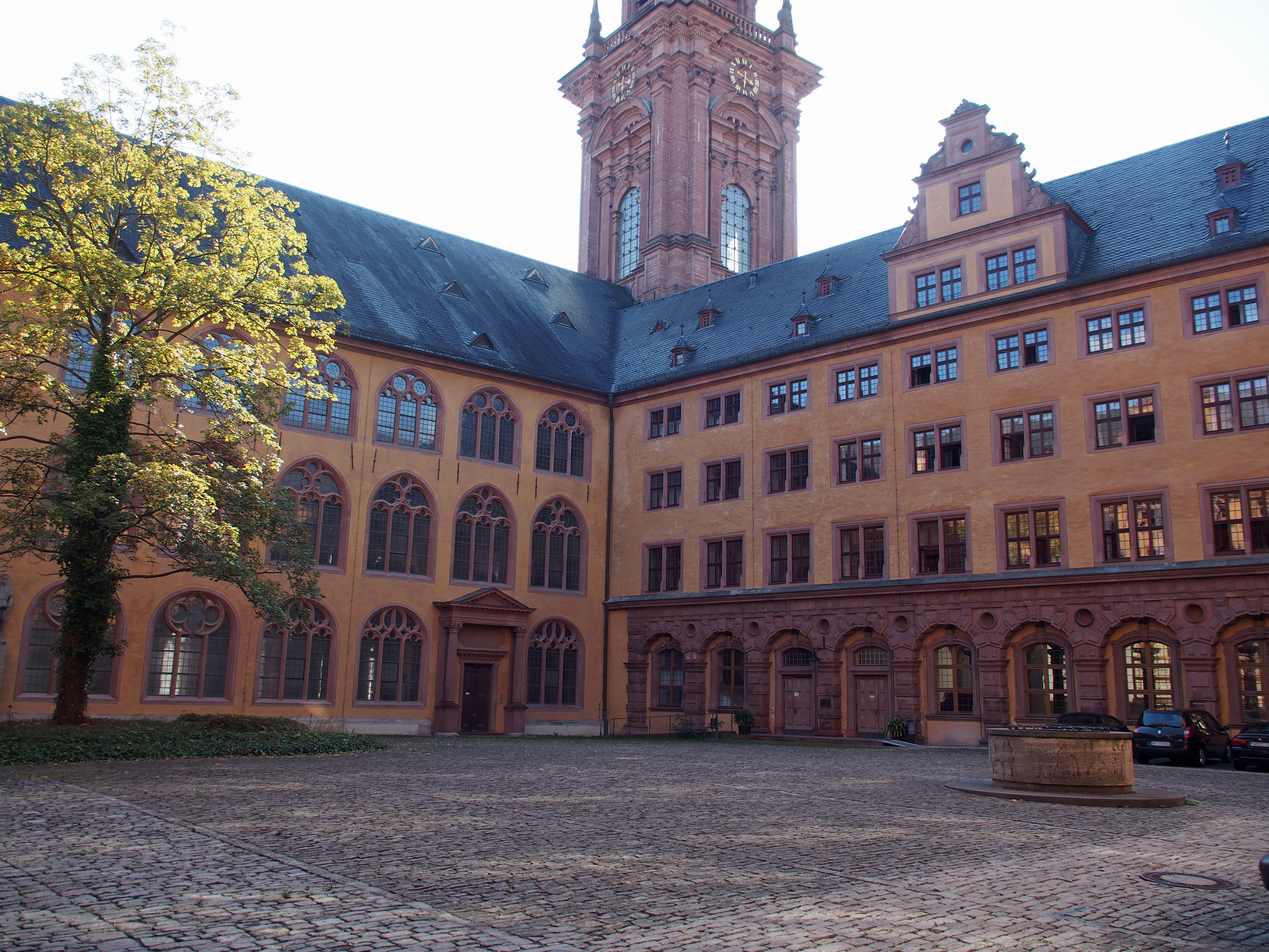 Innenhof der Alten Universität, Neubaustraße/Schönthalstraße/Domerschulstraße in Würzburg.